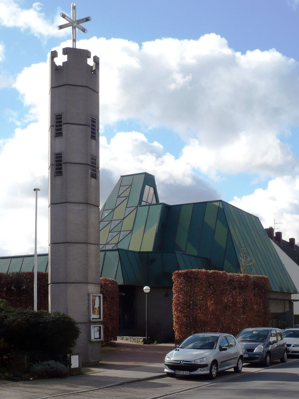 Christus König, kath. Kirche in Essen-Haarzopf